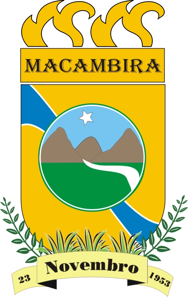 Brasão Municipal de Macambira-SE